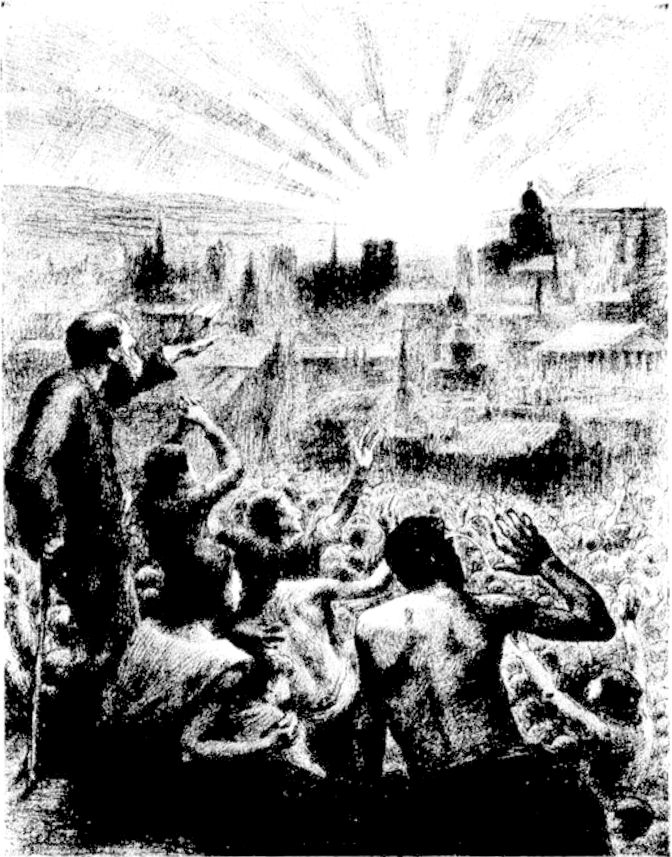 Reproduction d’une lithographie de Jehannet (Hippolyte Petitjean)